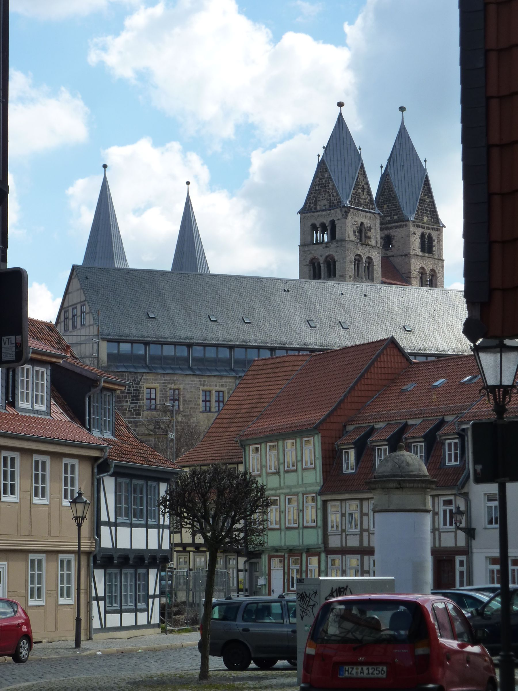 Halberstadt